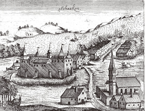 Schaaken (Nekrasowo), Ansicht nach Caspar Henneberger